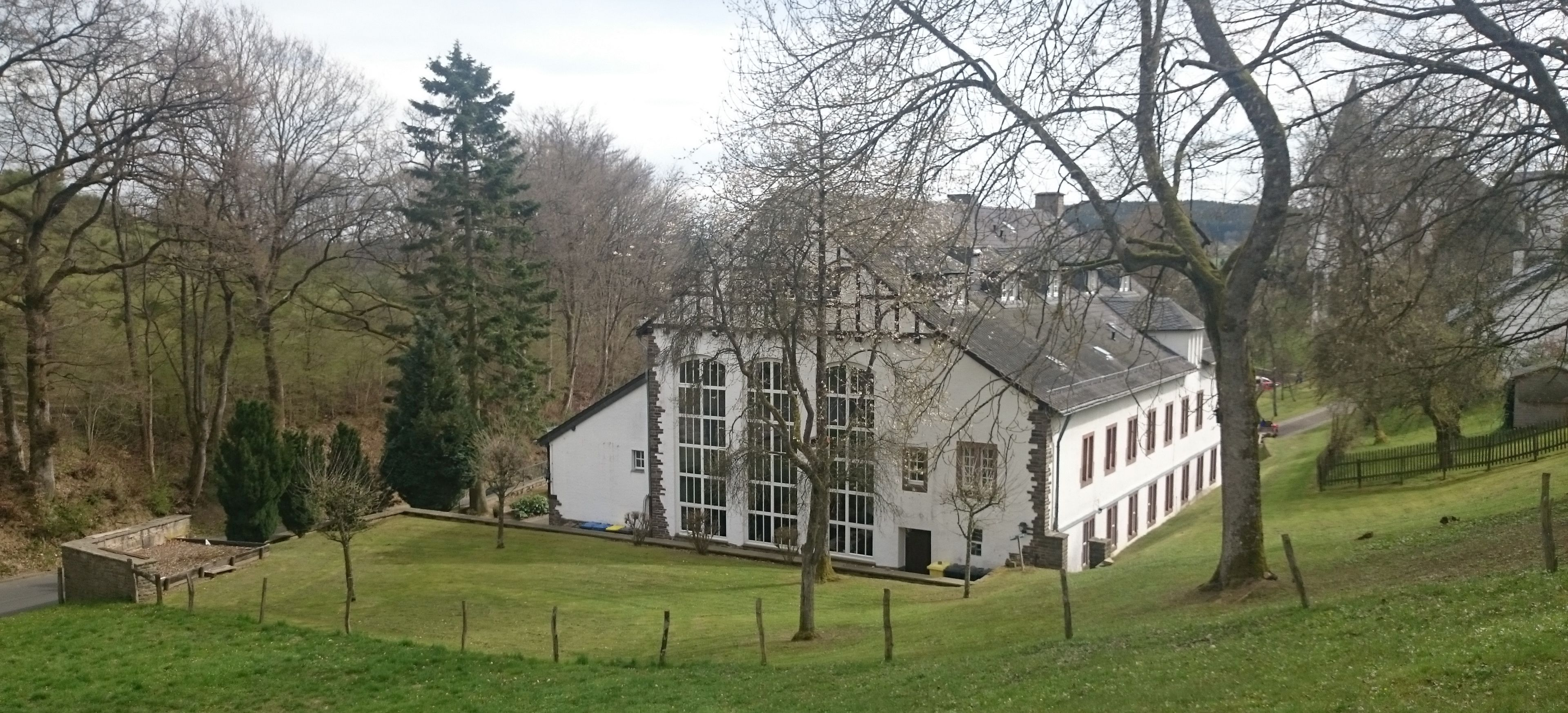 Haus für Lehrerfortbildung Kronenburg (Dahlem), ehemals Hermann-Göring-Meisterschule für Malerei